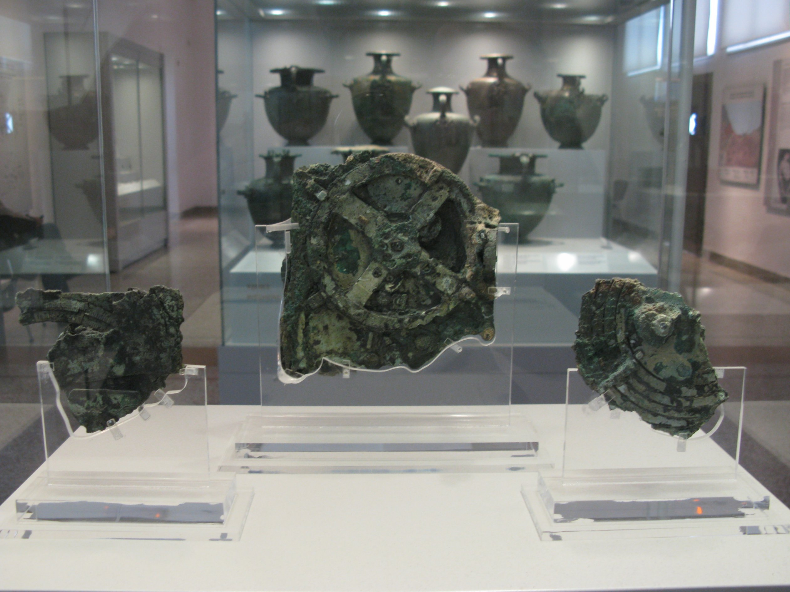 National Archaeological Museum, Athens, Greece. --- Ο ΜΗΧΑΝΙΣΜΟΣ ΤΩΝ ΑΝΤΙΚΥΘΗΡΩΝ 15087: θραύσματα από το μηχανισμό. Ο μηχανισμός αποτελείται από ένα πολύπλοκο σύστημα τριανιαδύο (32) οδοντωτών τροχών (γρανάζια) και πλακών, τα οποία φέρουν επιγραφές σχετικές με το ζωδιακό κύκλο και τους μήνες. Αρχικά πίστευαν ότι ήταν ένα είδος αστρολάβου, χρήσιμου στη ναυσιπλοΐα. Σύμφωνα με την πλέον αποδεκτή έως σήμερα ερμηνεία του καθηγητή Derek de Solla Price πρόκειται για έναν ημερολογιακό, ηλιακό και σεληνιακό υπολογιστικό μηχανισμό, δηλαδή μία πρωτότυπη συσκευή προσδιορισμού του χρόνου με βάση τις κινήσεις του ήλιου, της σελήνης, τις μεταξύ τους σχέσεις (εκλείψεις) και τις κινήσεις άλλων γνωστών για την εποχή αστέρων και πλανητών. Ο μηχανισμός κατασκευάστηκε πιθανότατα στην Ποσειδώνια Σχολή της Ρόδου από κάποιον ιδιοφυή μηχανικό. Ο Κικέρων, που επισκέφτηκε το νησί το 79/78 π.Χ., αναφέρει την κατασκευή παρόμοιας συσκευής από το στωικό φιλόσοφο Ποσειδώνιο τον Απαμέα. Το σχέδιο του μηχανισμού των Αντικυθήρων φαίνεται να ακολουθεί την παράδοση των πλανηταρίων του Αρχιμήδους και να σχετίζεται με τα ηλιακά ρολόγια. Εθνικό Αρχαιολογικό Μουσείο. Αθήνα.